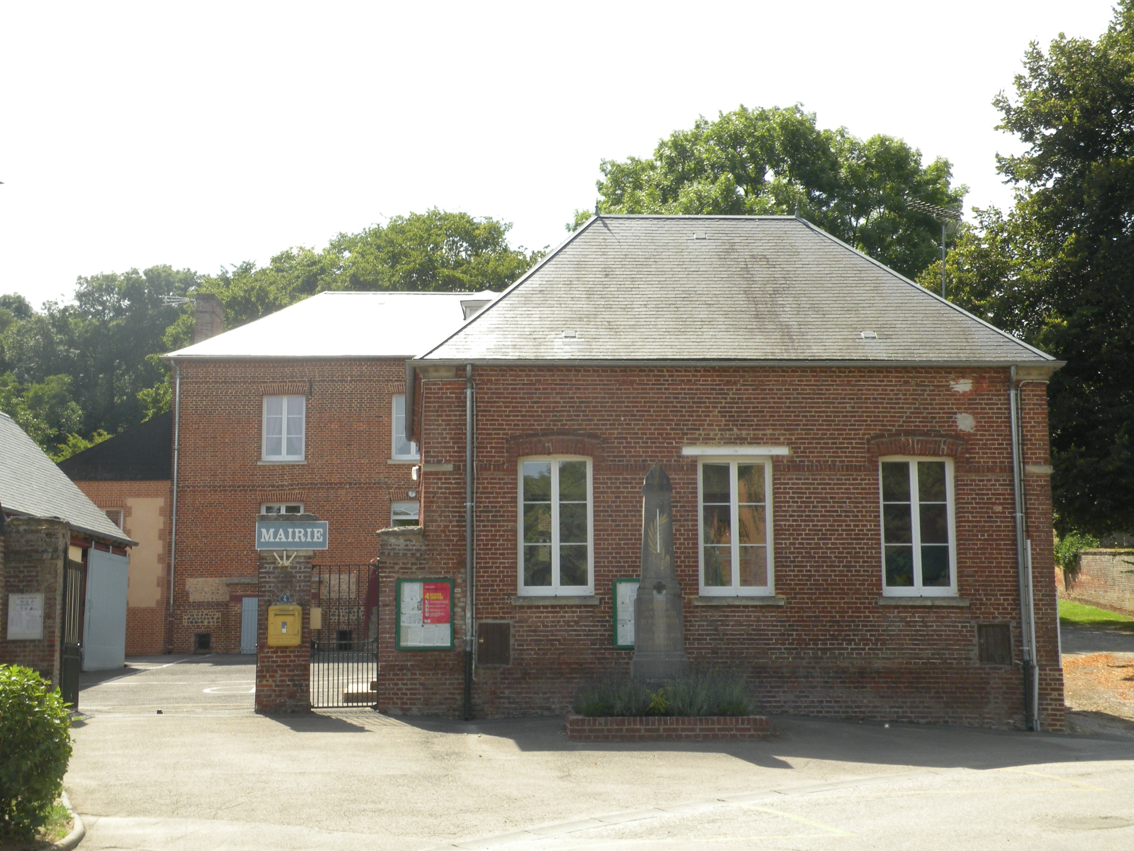 Roy-Boissy